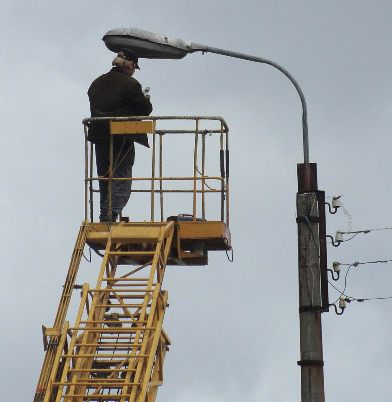 Электрики меняют лампочки на столбах в городе Северодвинске (Арх. обл).